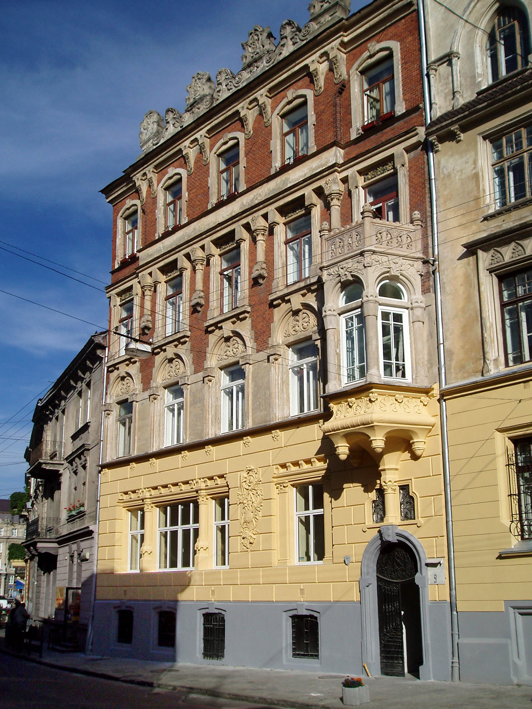 Будинок на вулиці Дудаєва, 9 у Львові, збудований 1906 року. Архітектор Вінцент Равський-молодший (1857—1927).